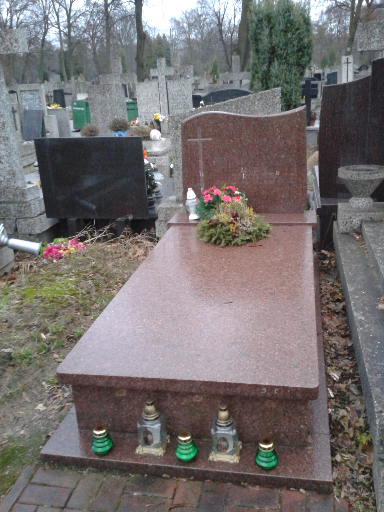 Grób rodzinny prof. Lucjana Wrotnego